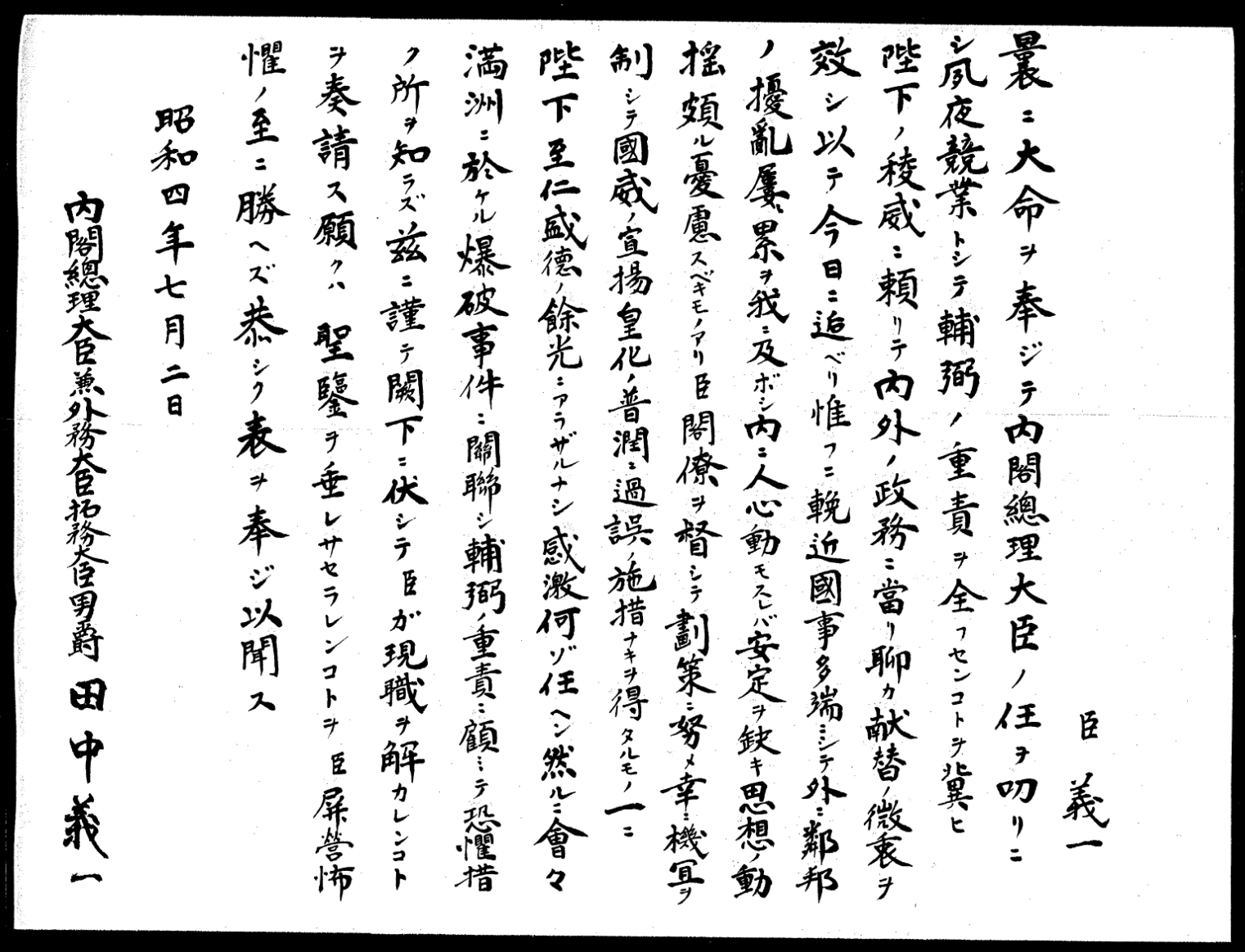 田中義一内閣総理大臣の辞表。